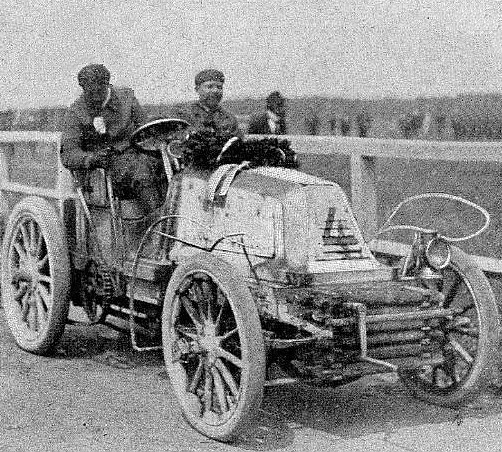 Henri Fournier victorieux à Berlin (Paris-Berlin 1901)